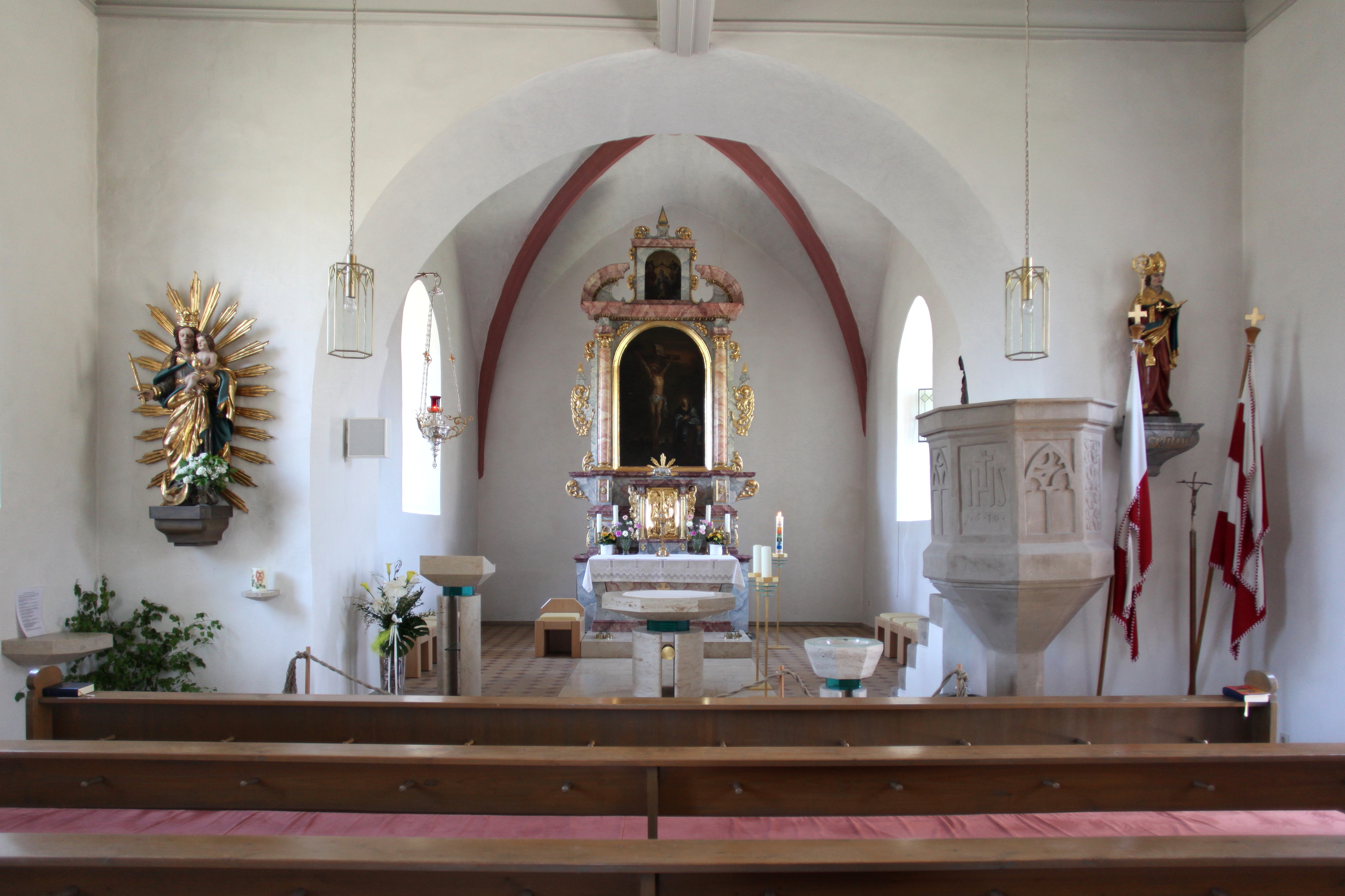 St. Kilian in Dietersdorf, Seßlach